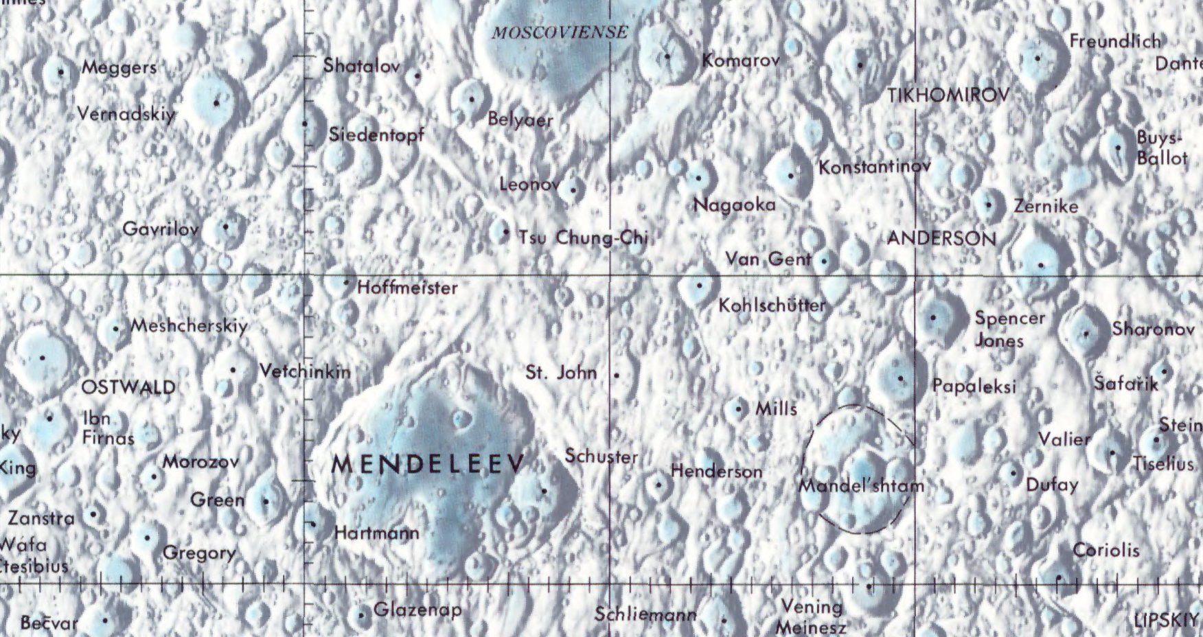 Cráter lunar St. John. Localización. (Lunar Chart LPC1. Second Edition)